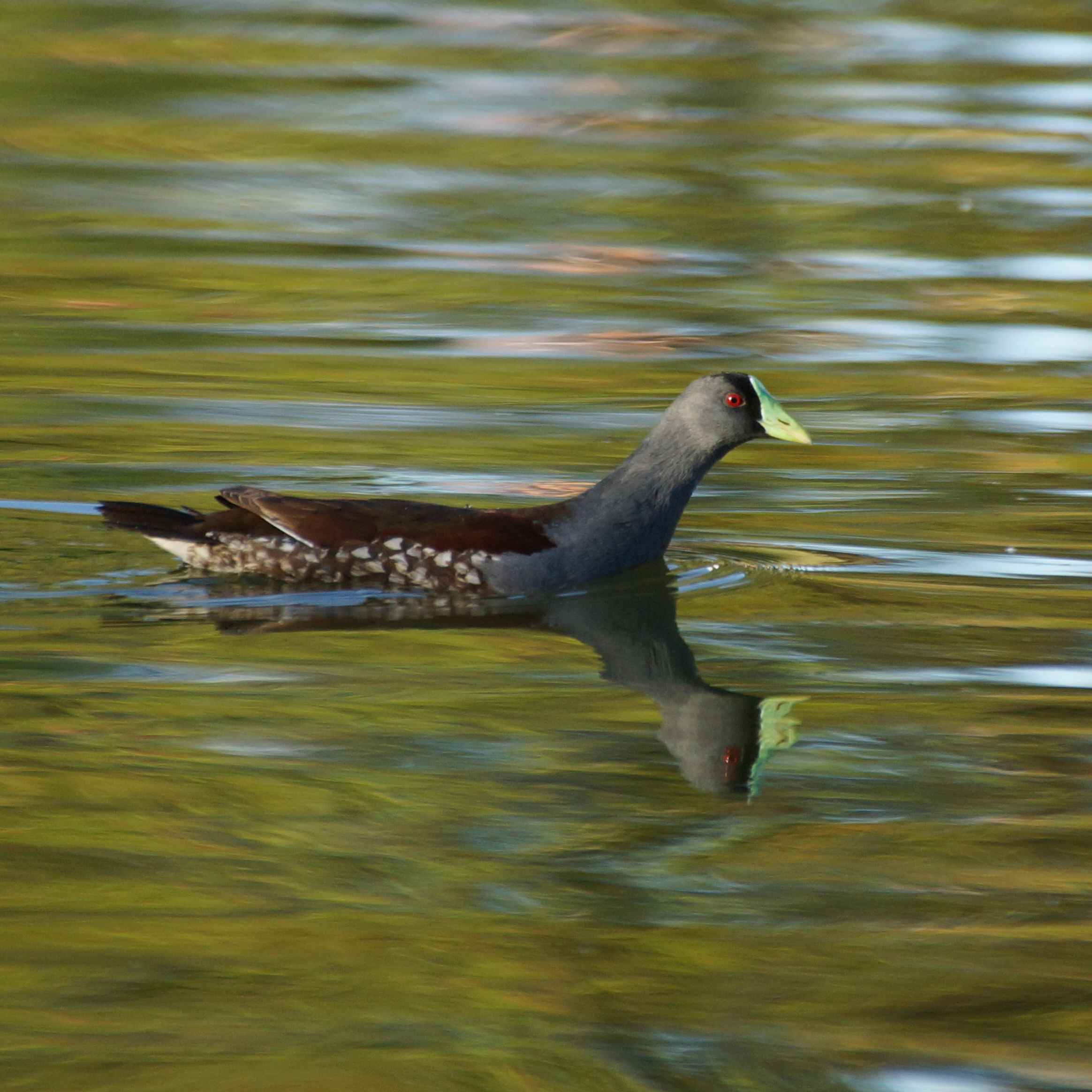 Recorte gallineta pintada (Gallinula melanops) nadando, en la sabana de bogotá. límites Bogotá-Chia